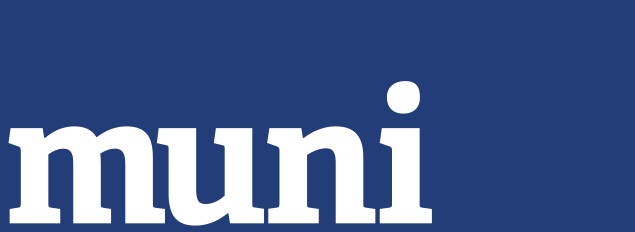 logo Muni, měsíčníku Masarykovy univerzity